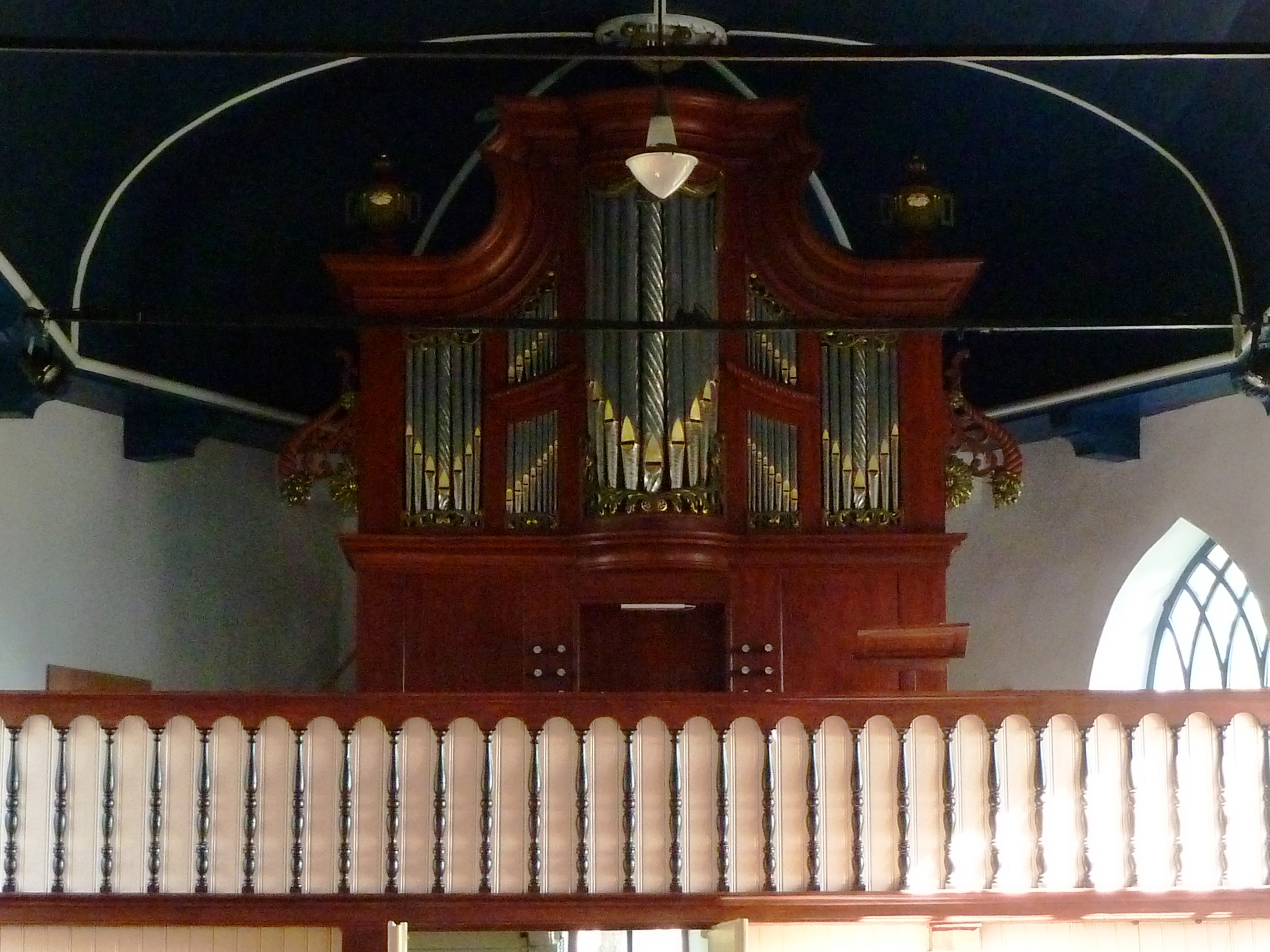 Orgel van de kerk in Niehove. Oorspronkelijk uit 1575, geplaatst in 1908.